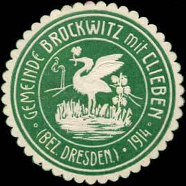 Sealing stamp Title: Gemeinde Brockwitz mit Clieben Bez. Dresden Description: grün, weiß, geprägt Place: size: 4 cm